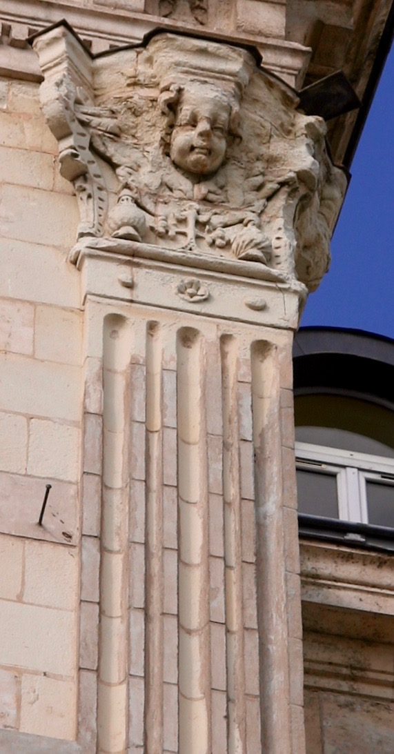 colonne de la façade est du lycée Jacques -cœur Bourges,France.